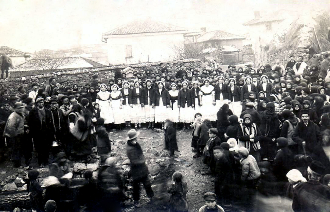 Топеница в село Габра, 1931 година